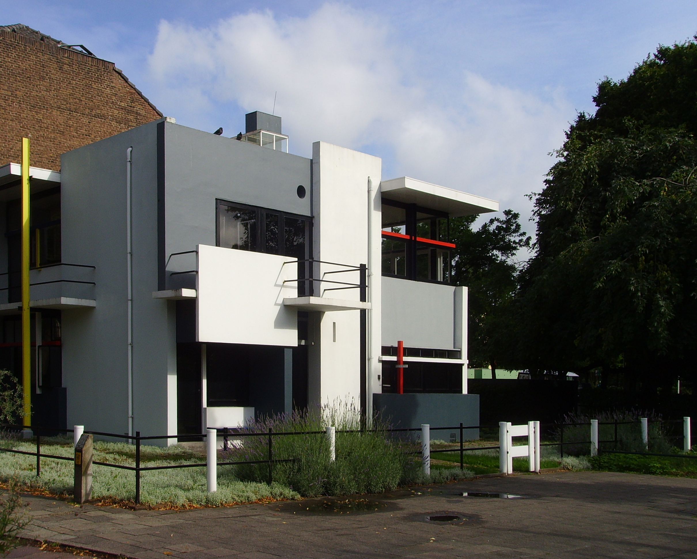 Het Rietveld-Schröderhuis in Utrecht vanaf de Prins Hendriklaan